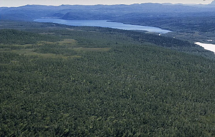 Motiv: Maskien Nyckelord: Flygbilder, Riksintressen Kategori: Sameviste Maskien